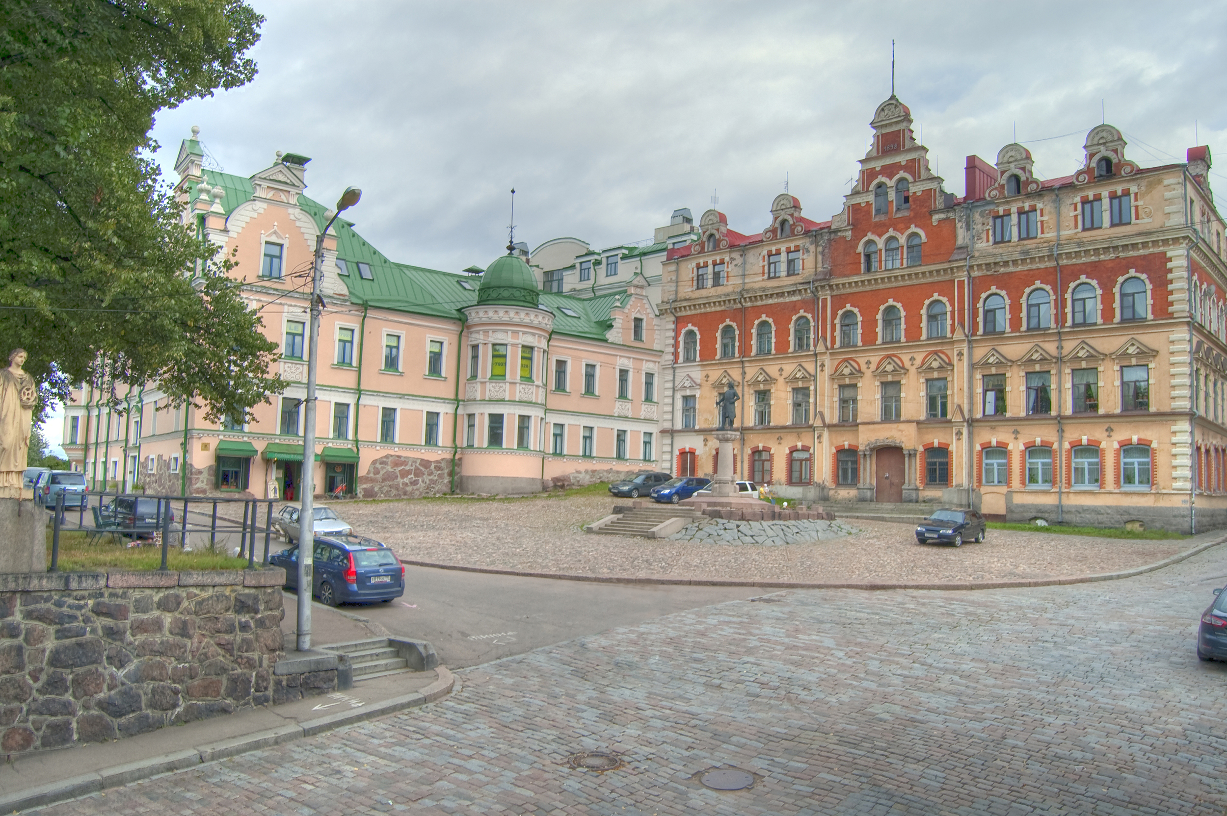 Здание городского музея (бывшая ратуша): улица Крепостная, 2, Выборг, Выборгский район, Ленинградская область